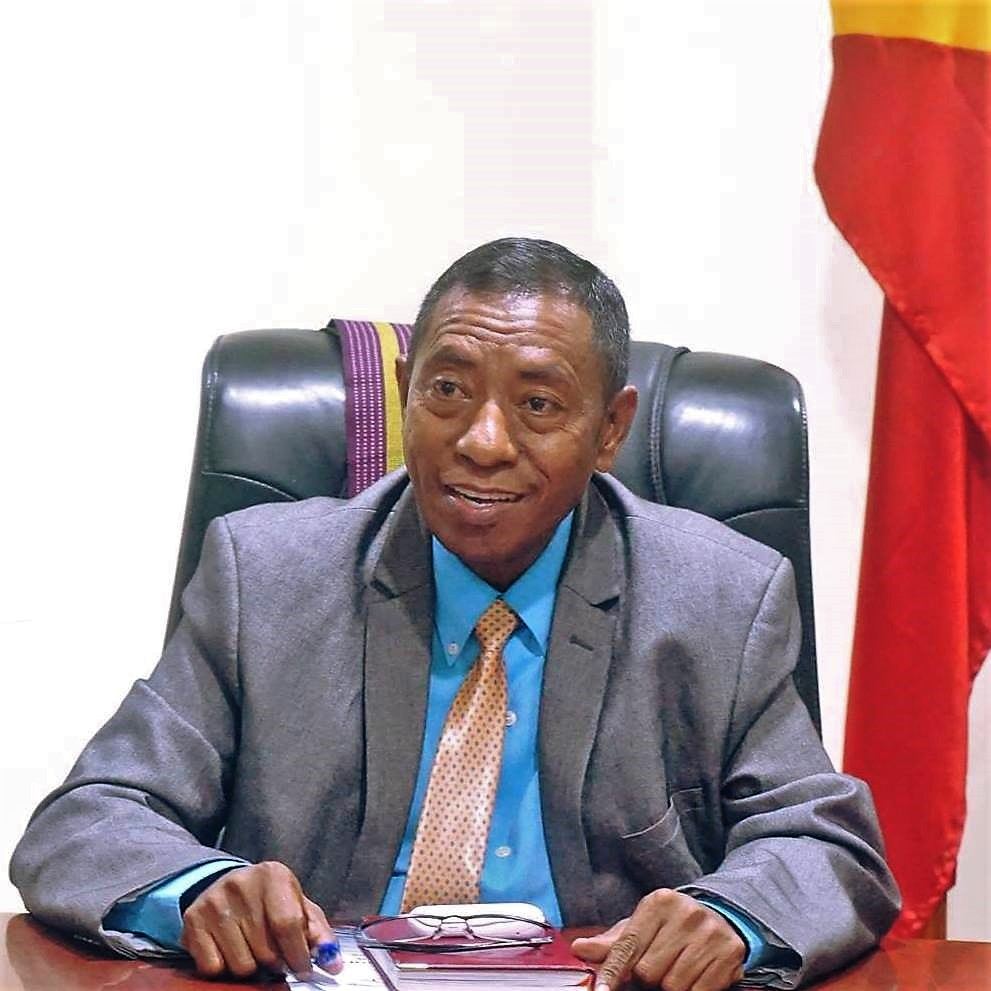 Ministro Dos Transportes e Comunicações José Agustinho da Silva